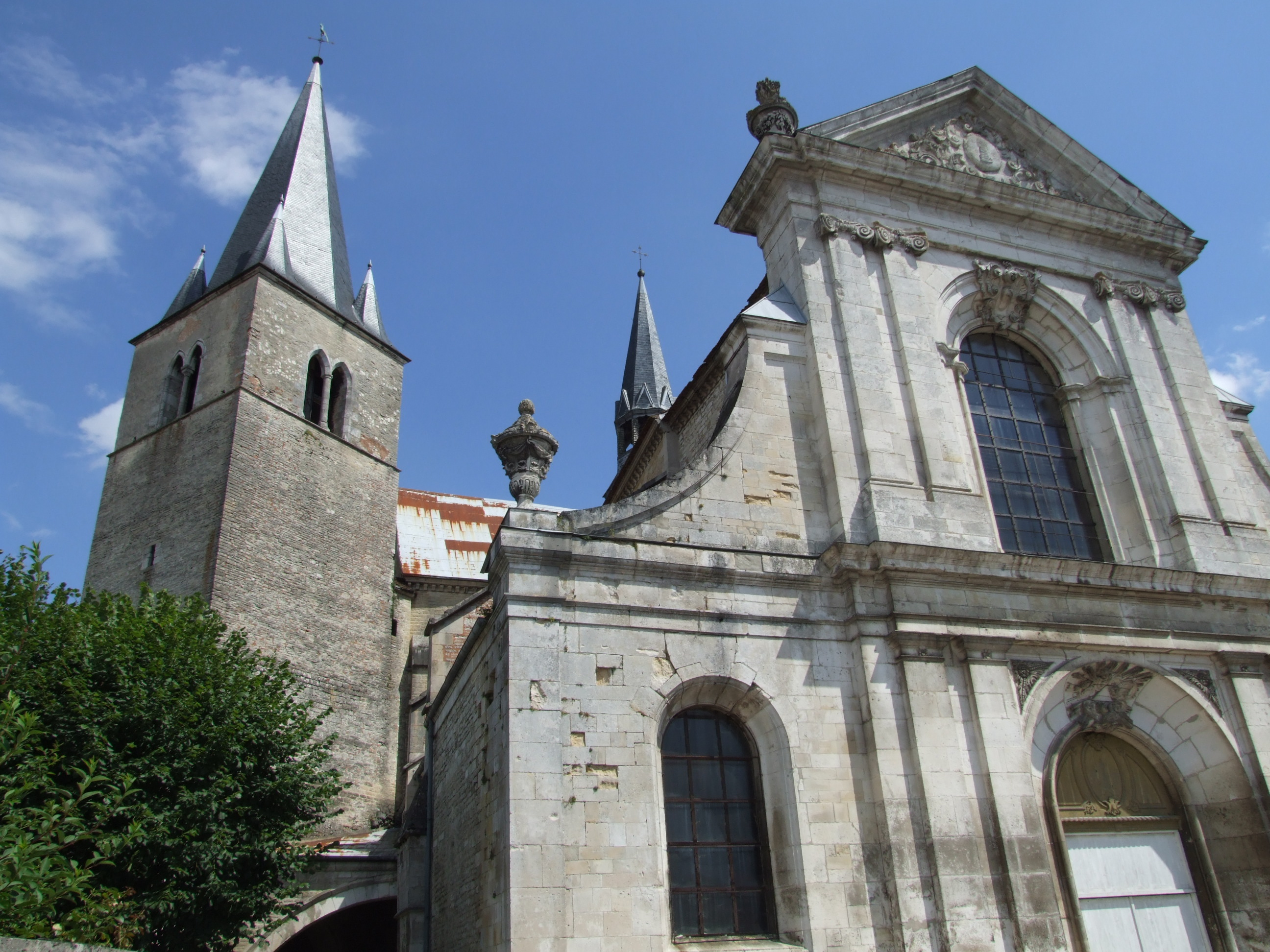 Bar-sur-Aube, Aube, Champagne-Ardenne, FRANCE